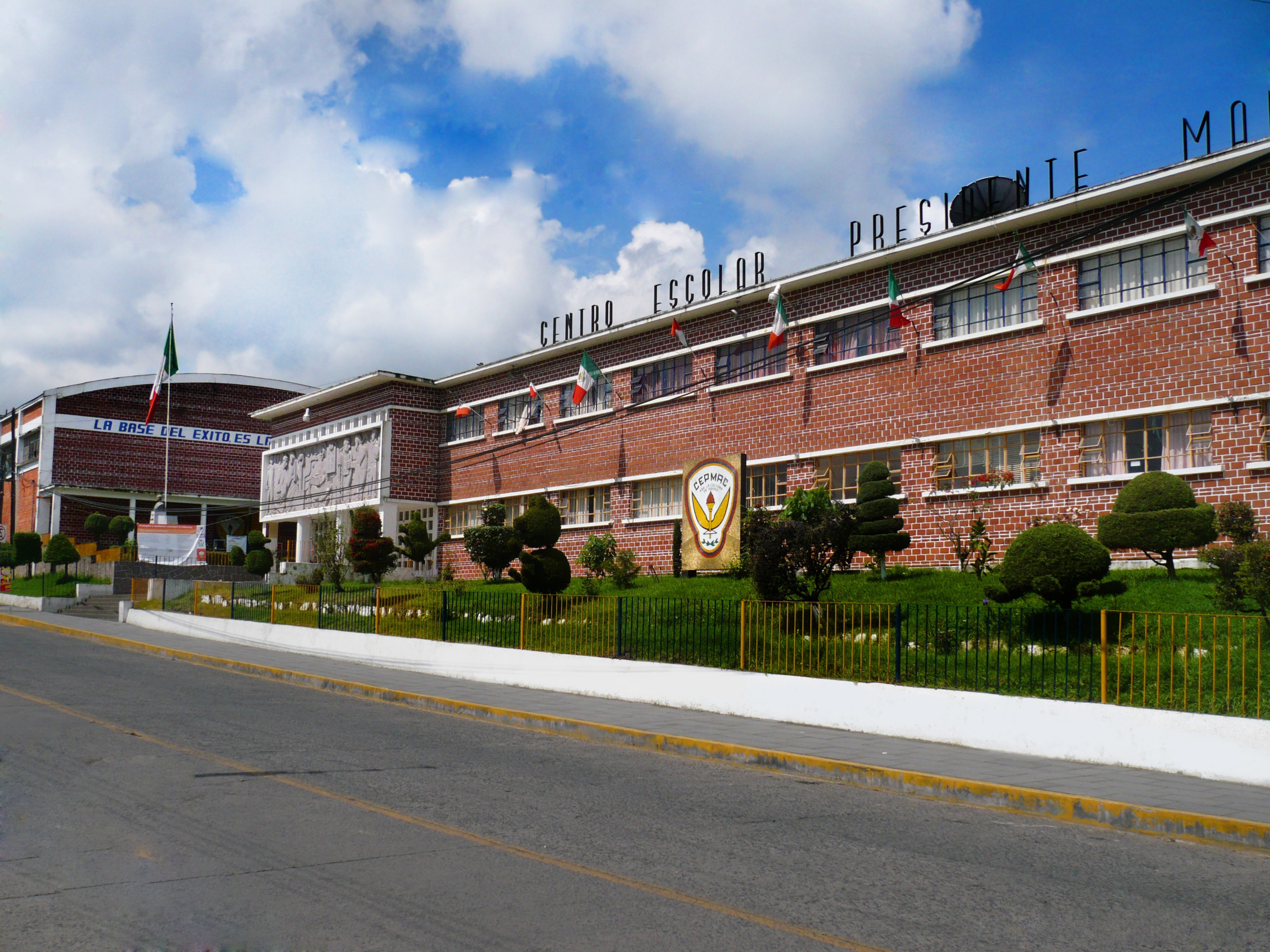 Centro Ecolar (CEPMAC) 2009